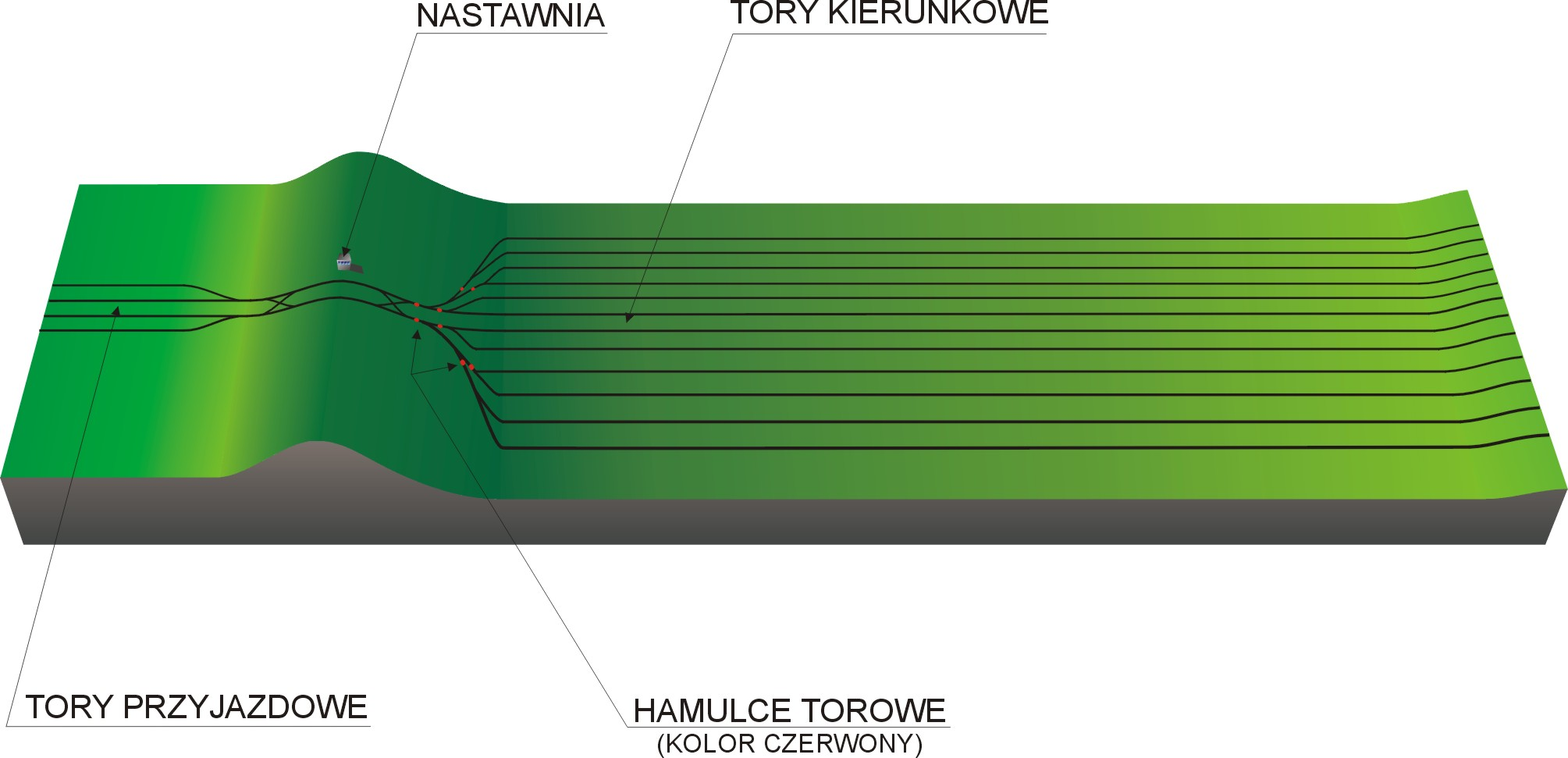 Górka rozrządowa - autor grafiki Sylwek, w oparciu o książkę "Zarys kolejnictwa".